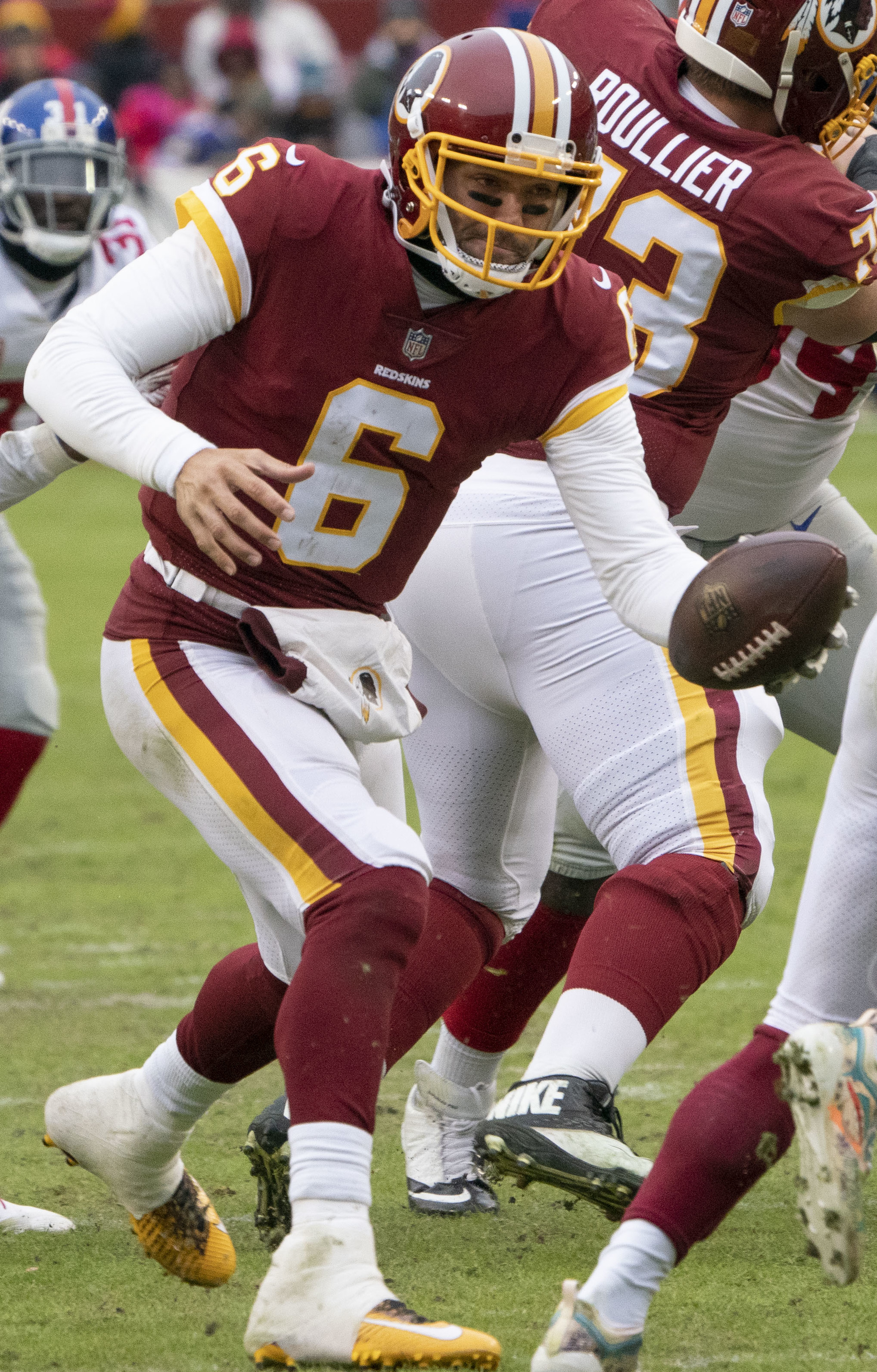 Giants at Redskins 12/09/18